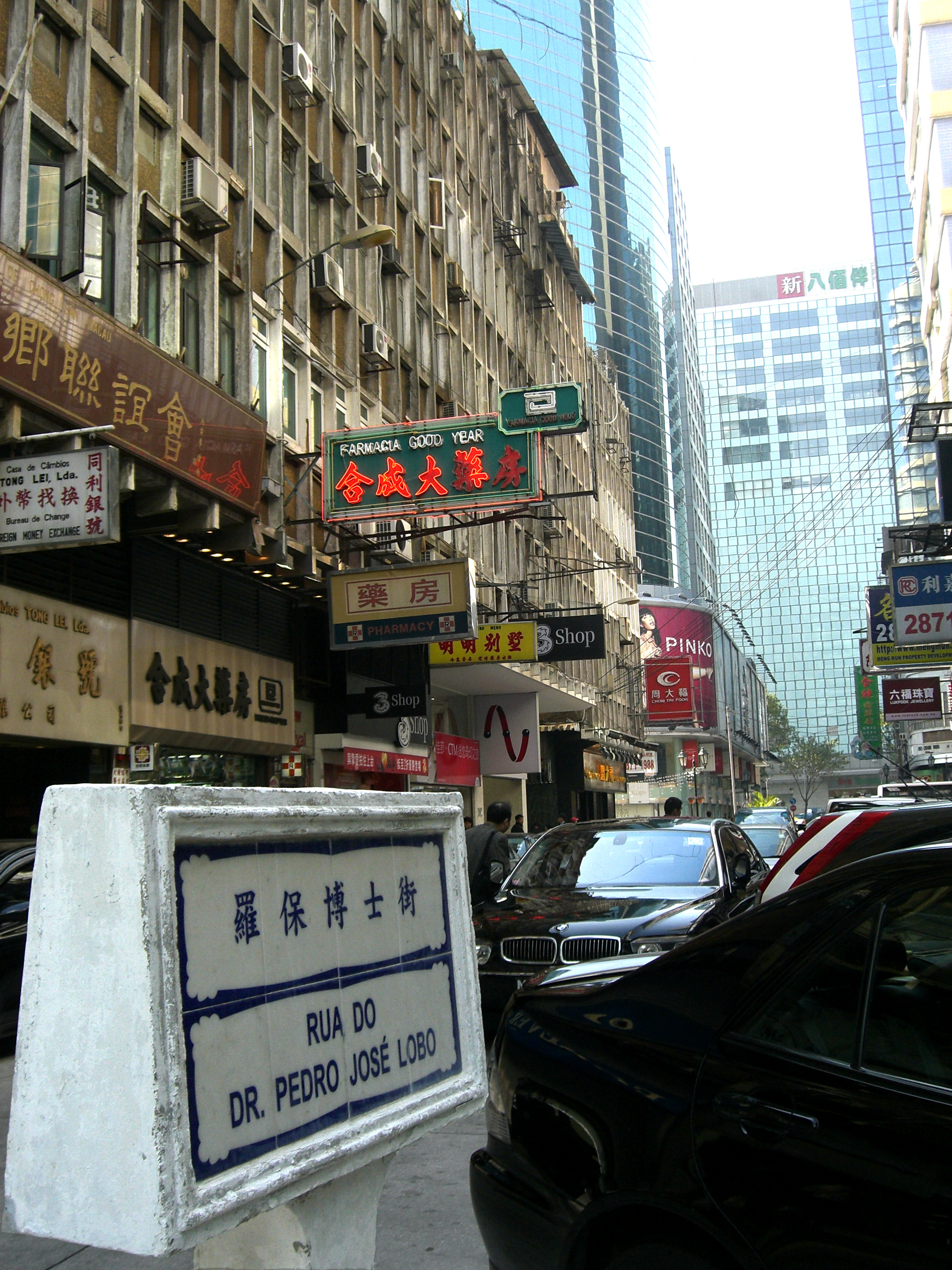 羅保博士街